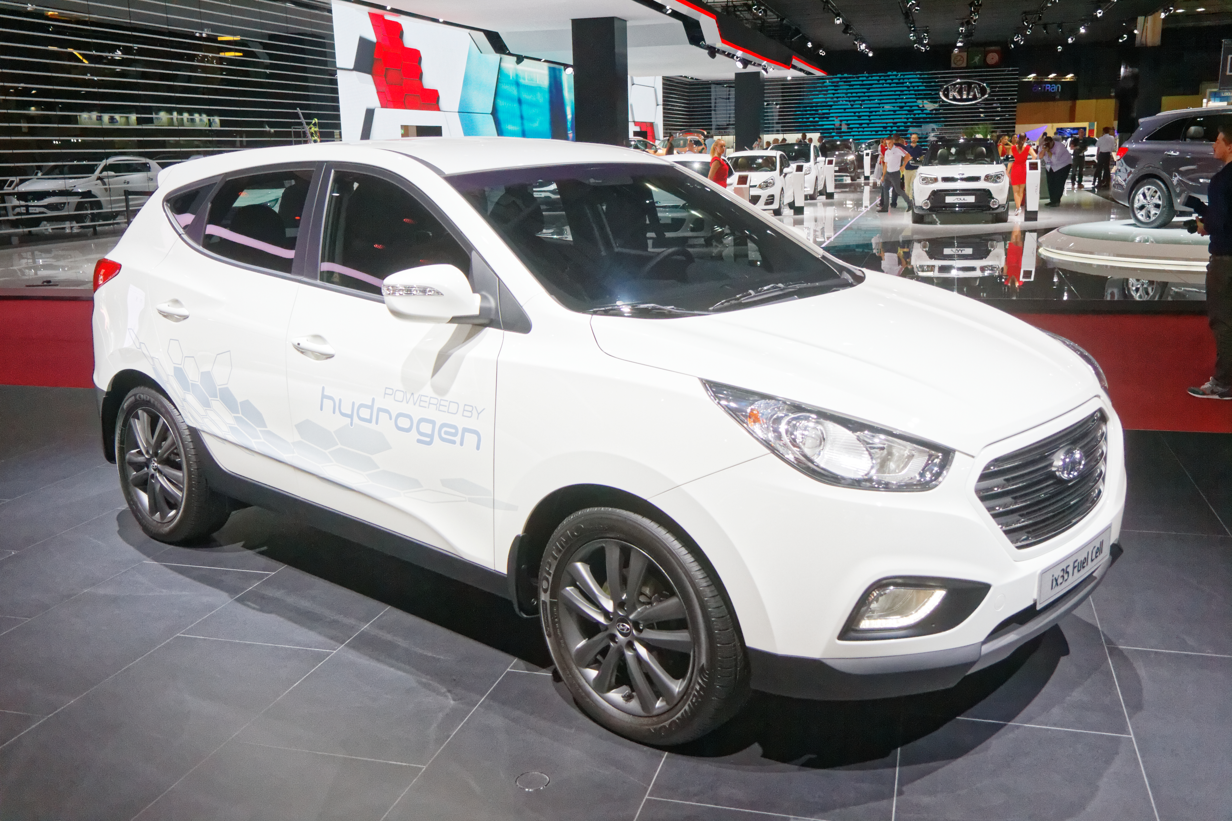 Un Hyundai i35 présenté lors du mondial de l'automobile de Paris 2014.